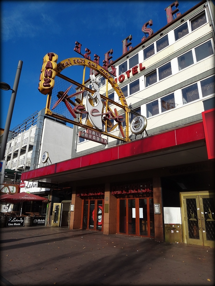 Café Keese, Hamburg, Vorderseite